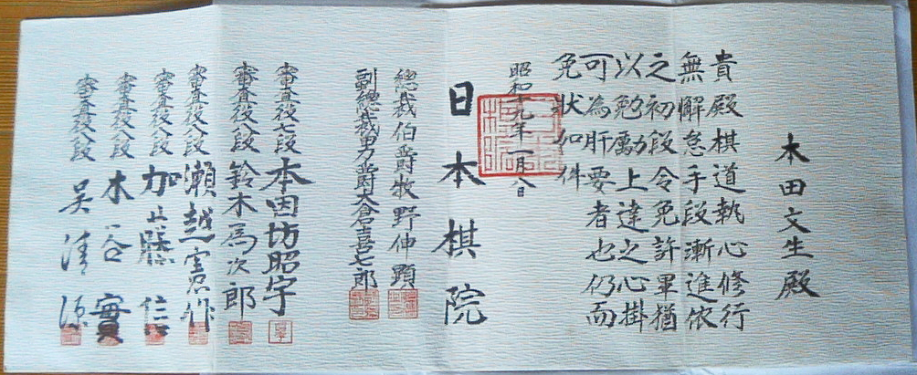 日本棋院に展示されている初段允許状（寄贈前に投稿者本人が撮影）